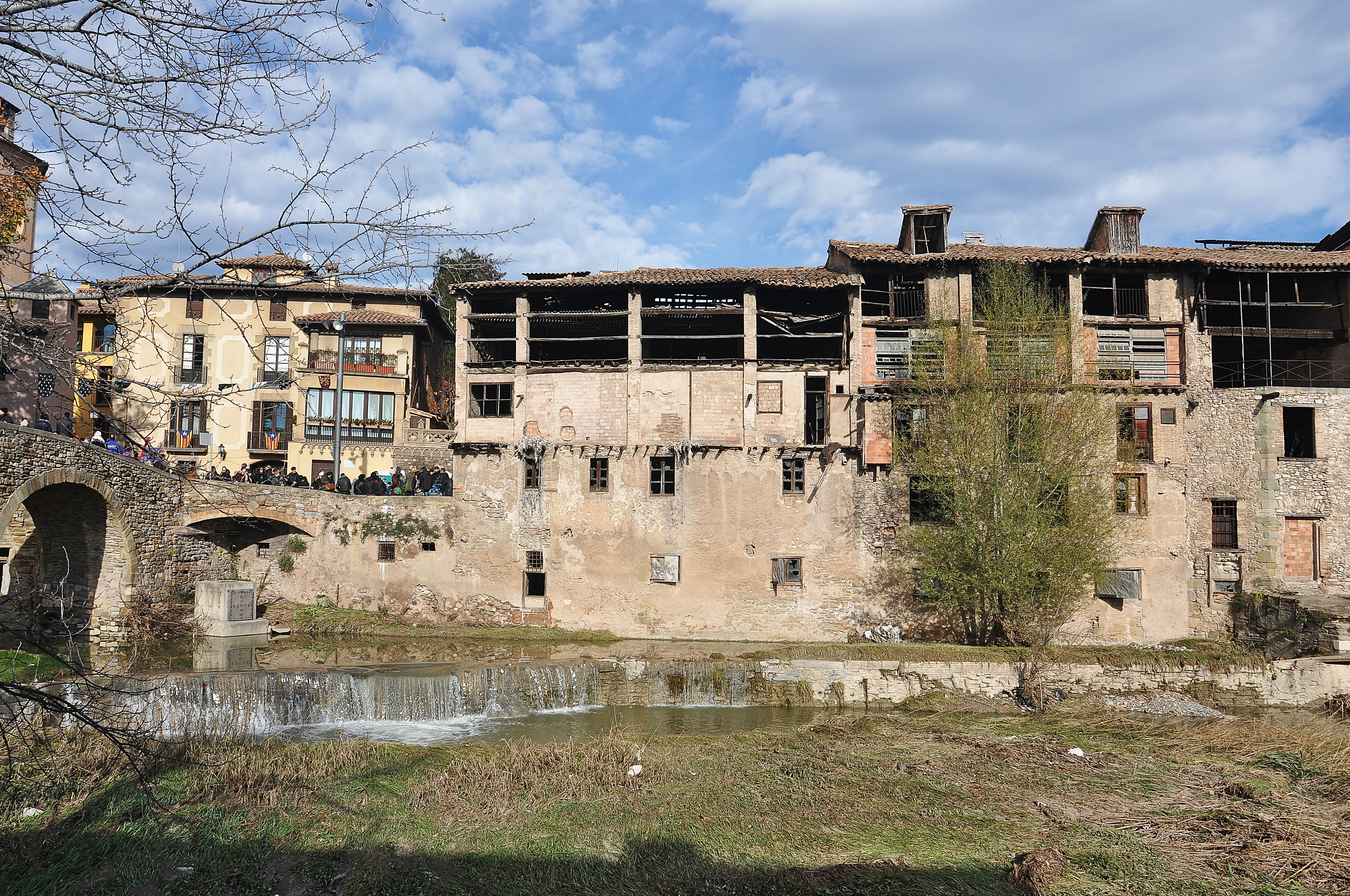 nuclio antiguo de vic